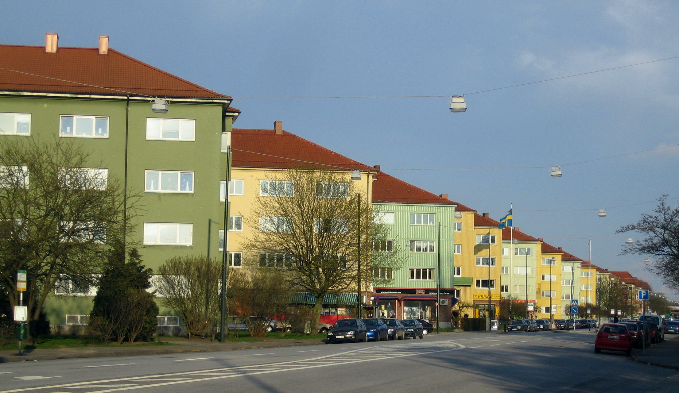 Lönngården in Malmö by the street Lönngatan.